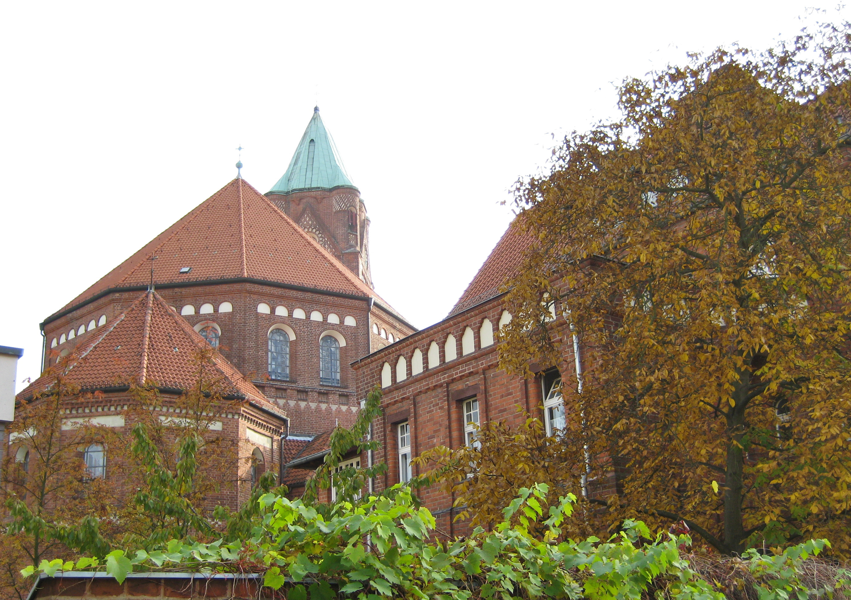 St. Maria, Hilfe der Christen